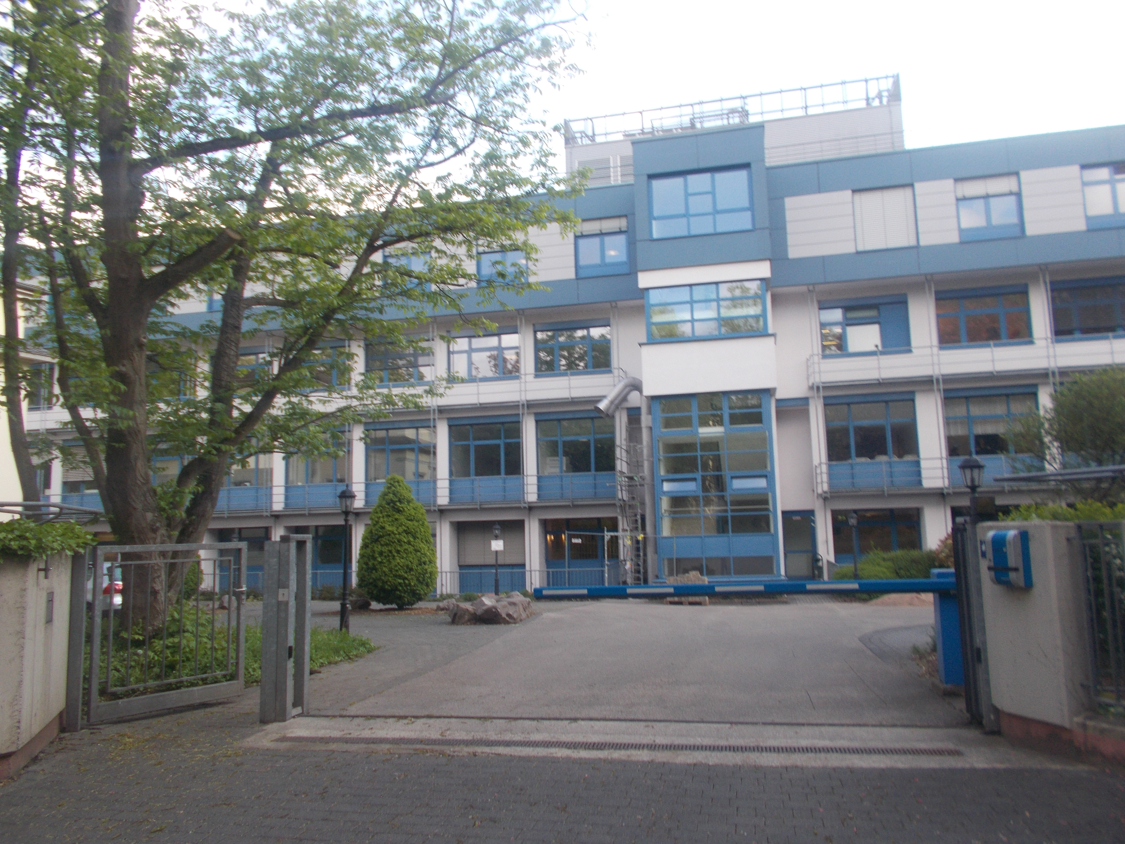 Krankenhaus an der Nordallee Trier